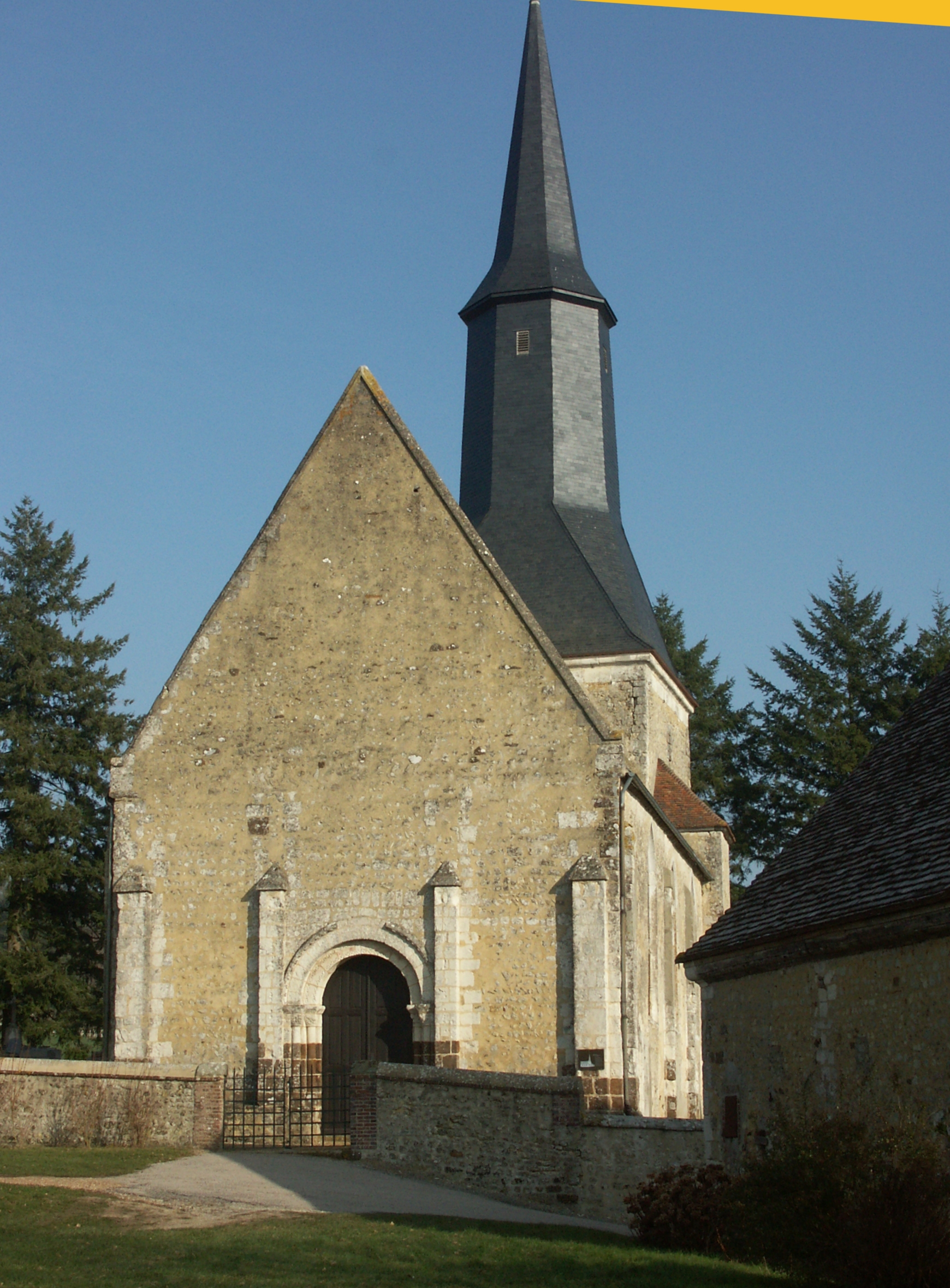 Selon la légende de saint Evroult la construction fut décidée en 994 . Edifice d’époque romane (abside, porche) remanié par la suite (notamment percement des baies au 16e). Clocher-tour carré. Sacristie adossée au chevet. CMH 1965. ext, façade ouest